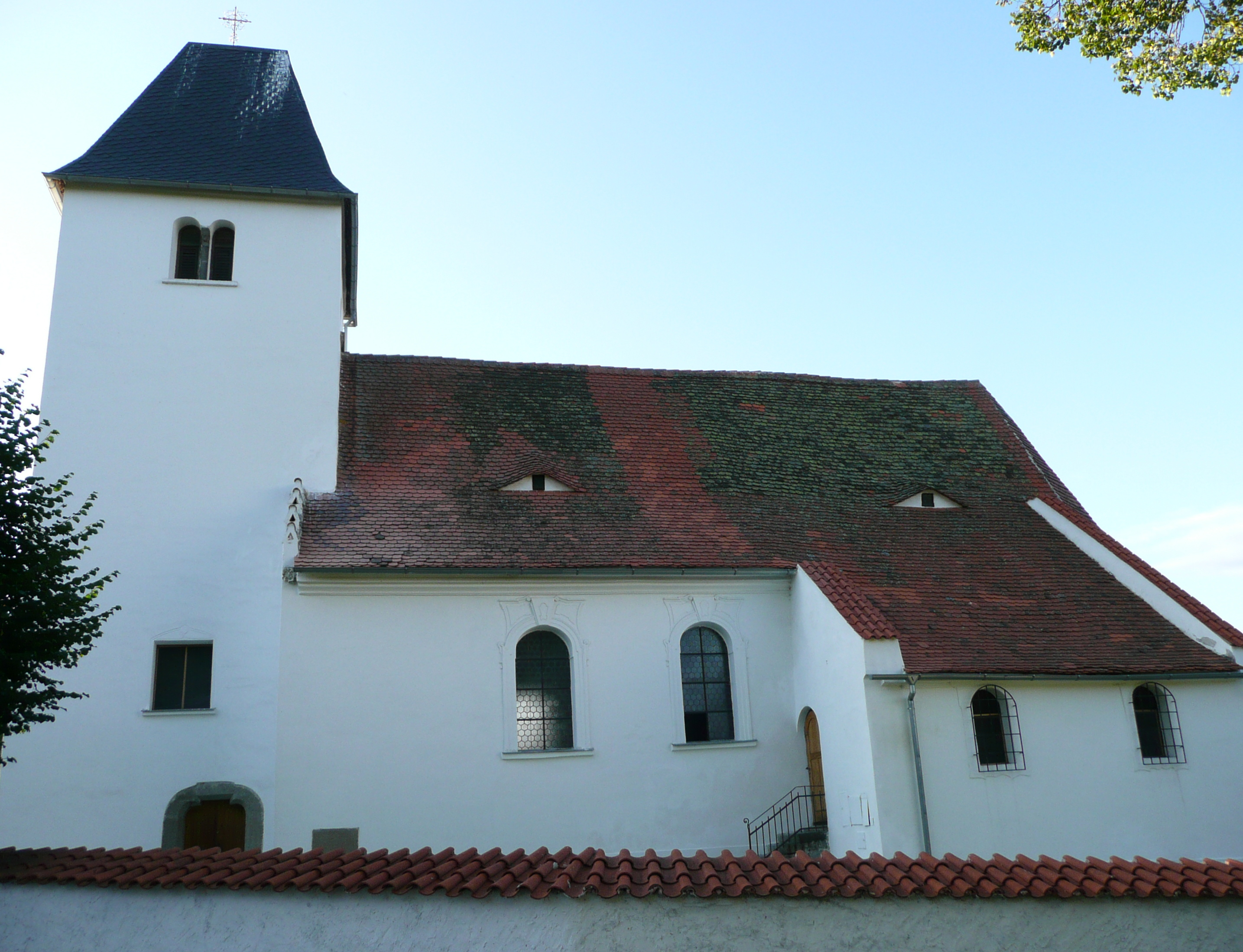 Zbynice (okr. Klatovy), kostel Zvěstování Panny Marie od jihovýchodu.